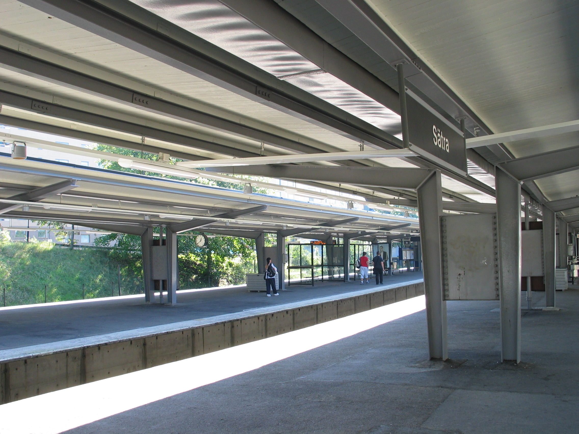 Sätra, a metro station in Stockholm, Sweden.